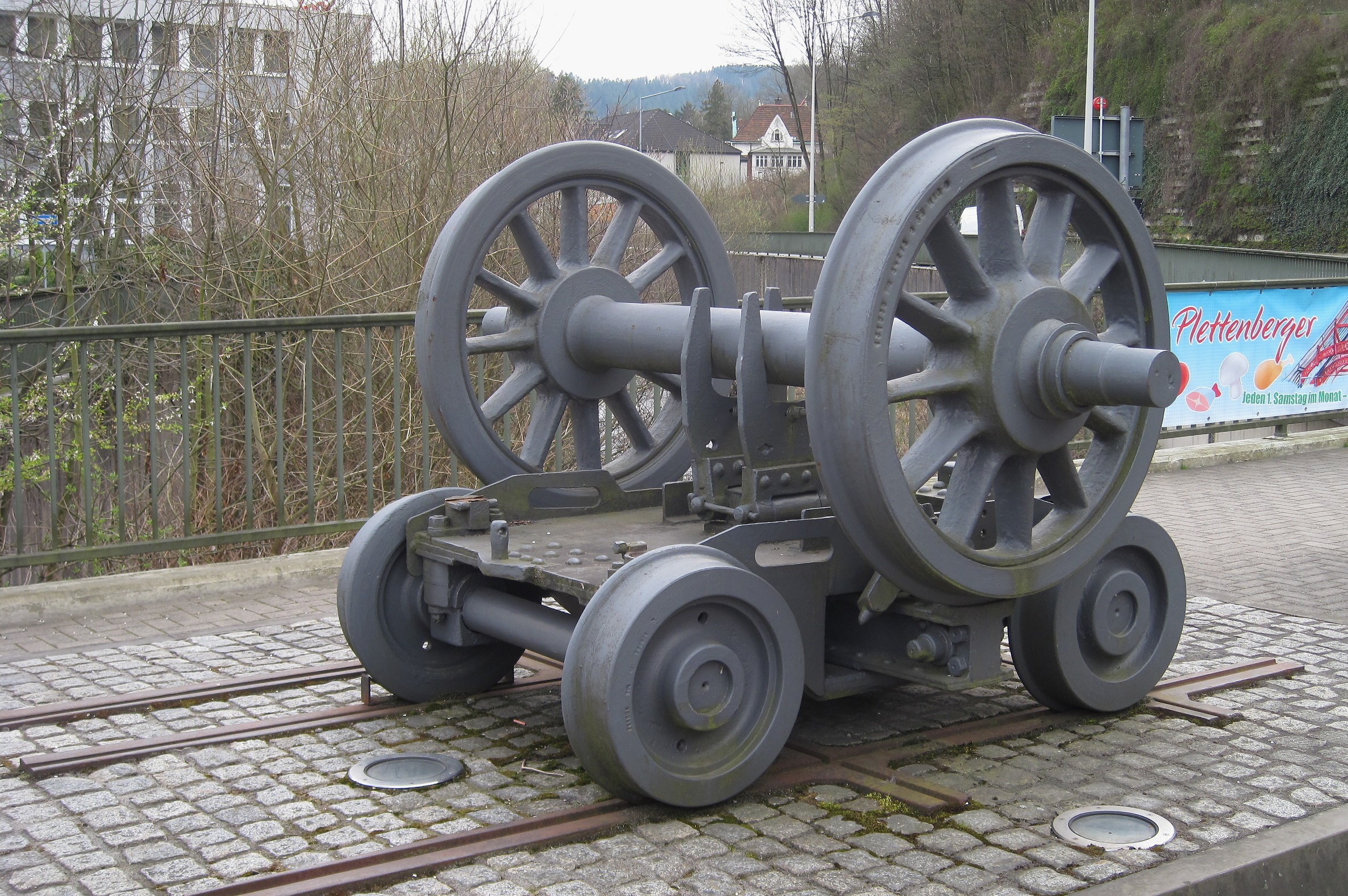 Denkmal Rollbock mit Regelspurachse auf einer Gleiskreuzung (Schmalspur) in Plettenberg, Am Wall/Umlauf 21. Zur Erinnerung an die Plettenberger Kleinbahn (1896 bis 1962).